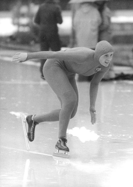 Sabine Becker ADN-ZB Thieme 15.12.79 Karl-Marx-Stadt: DDR-Meisterschaften im Eisschnellauf- Mit neuem Bahnrekord über 1000m holte sich Sabine Becker vom SC Dynamo Berlin begleitet vom strömenden Regen ihren zweiten Meistertitel.